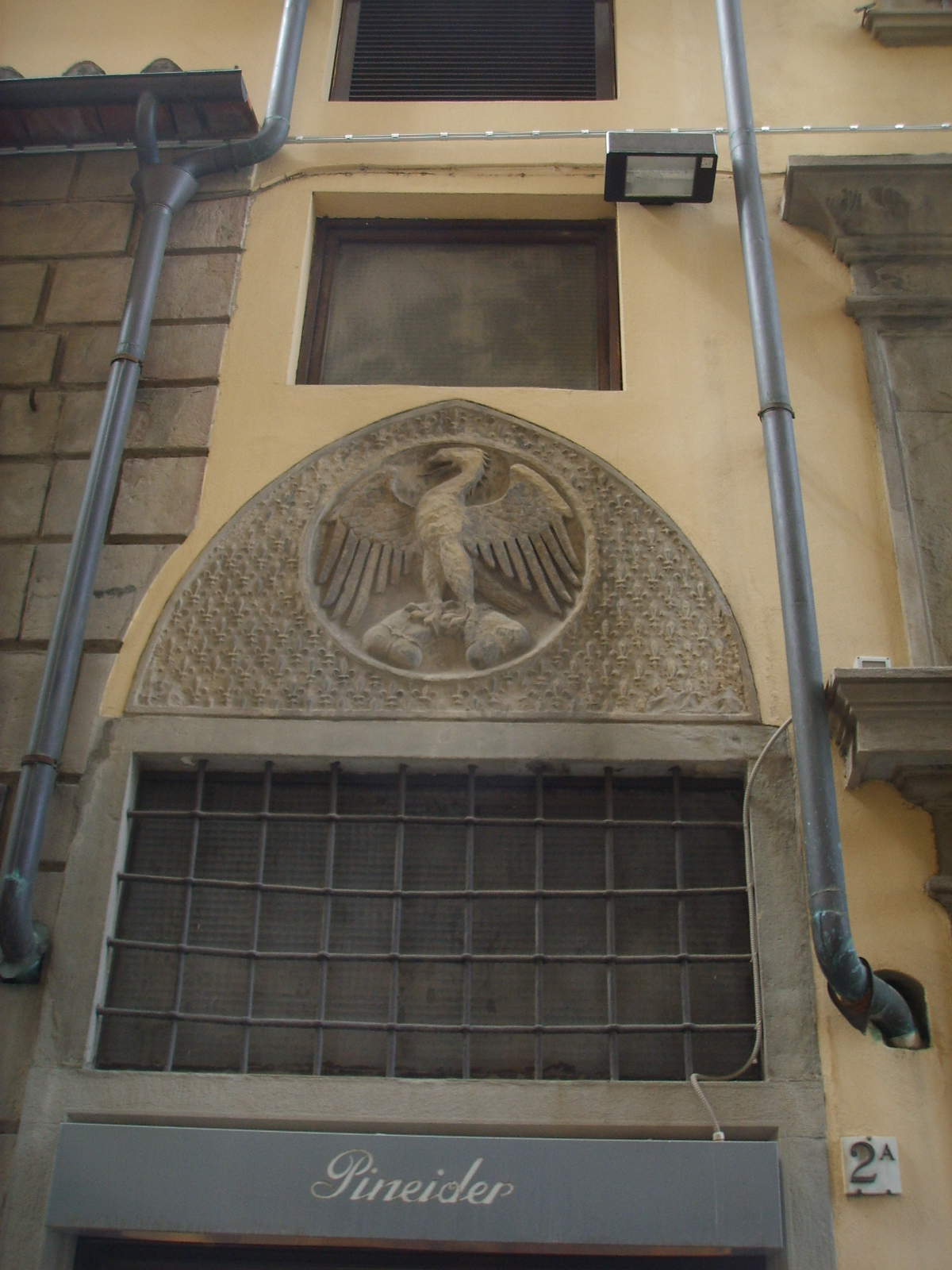 Via calimaruzza